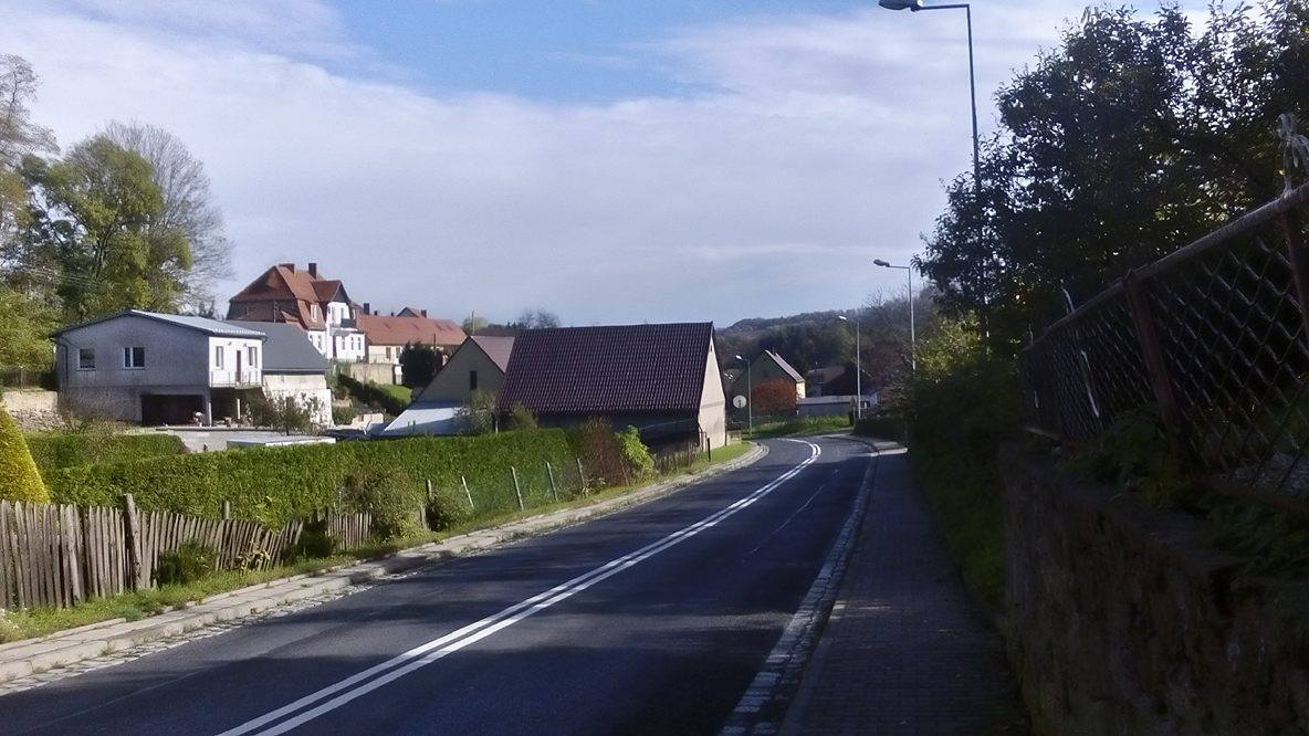 Środkowa część wsi z DW364